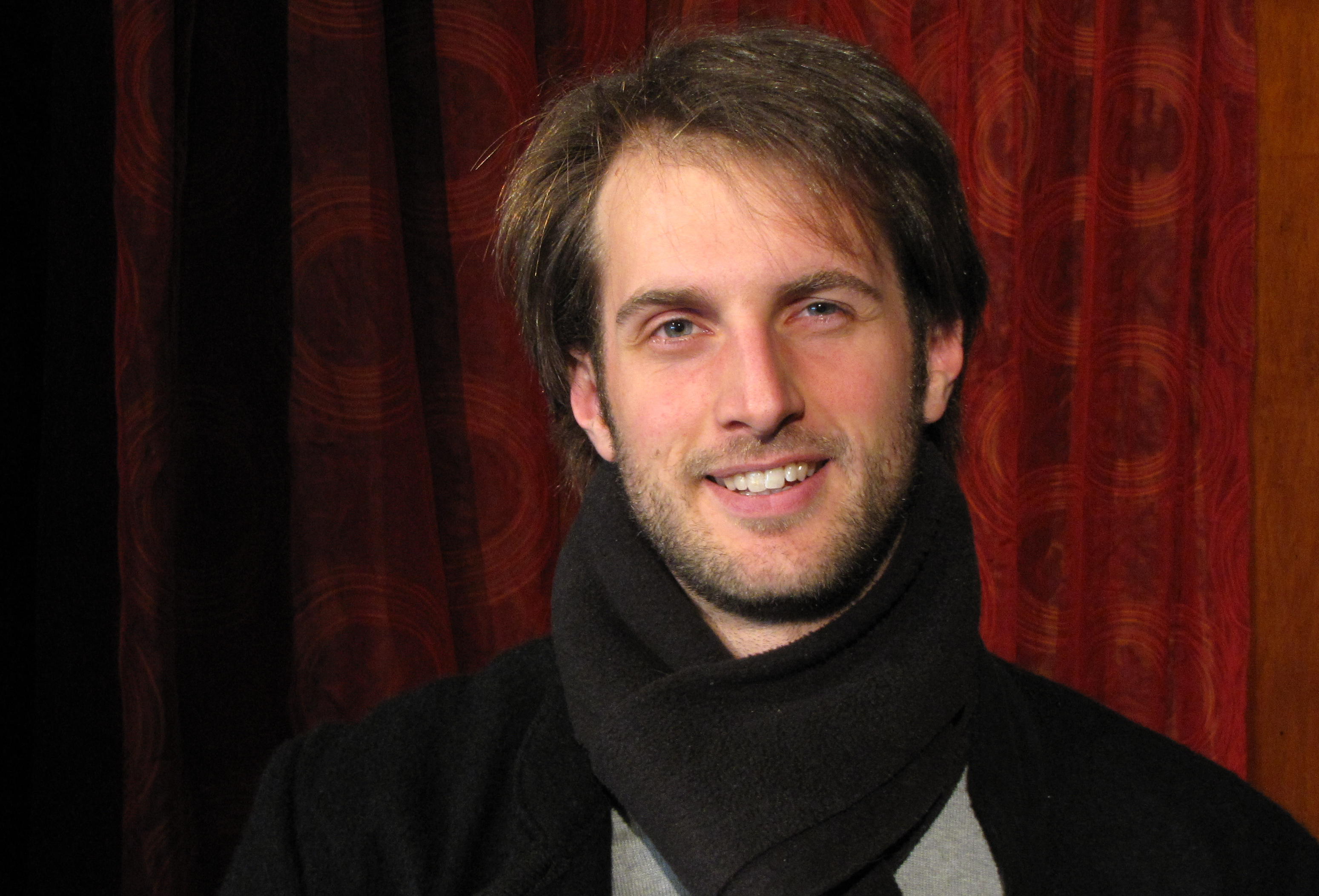 Pius Jauch / Portrait 2010